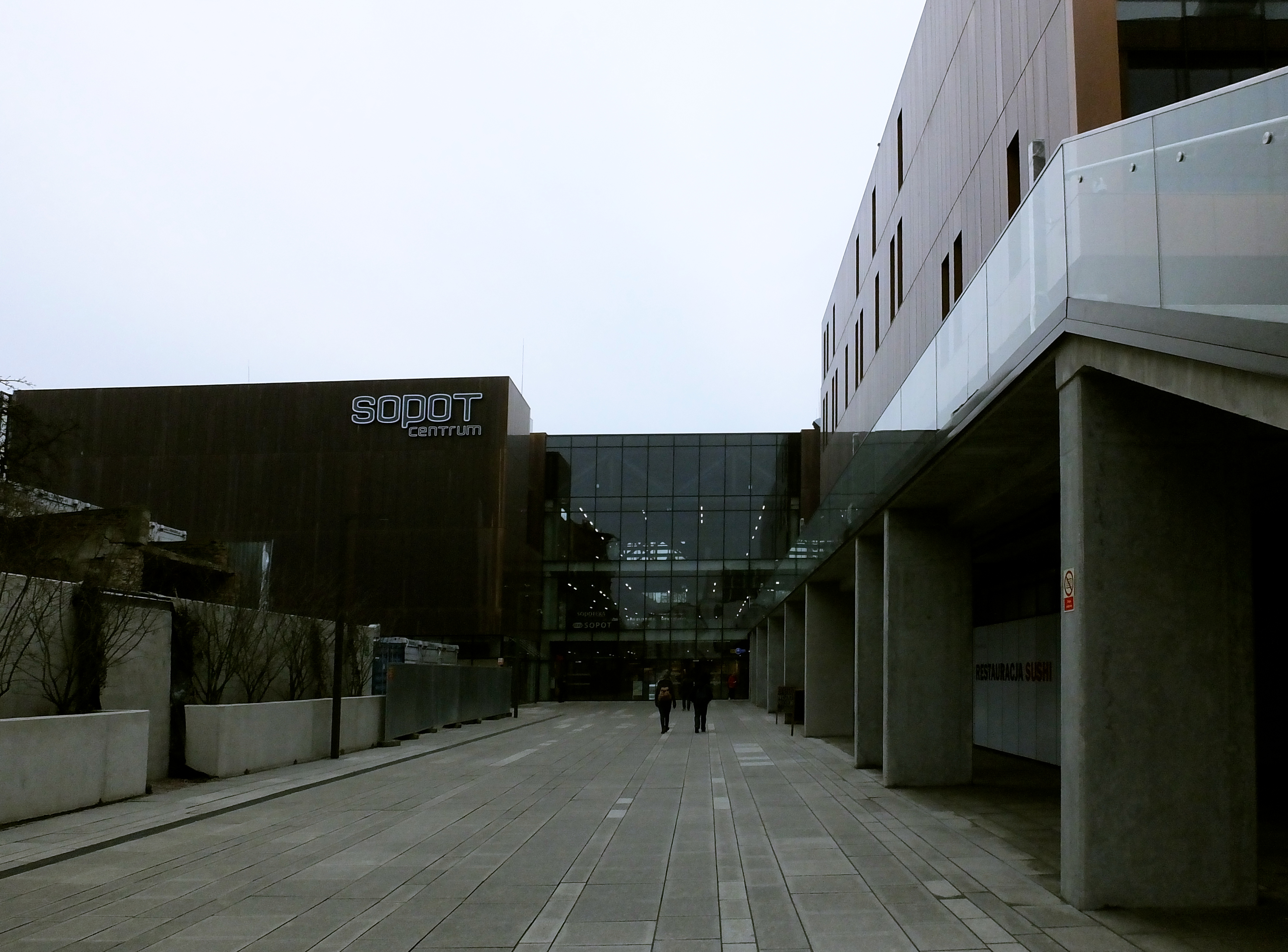 Sopot Centrum (Nowe Centrum Sopotu) – kompleks budynków handlowo-usługowych połączonych z dworcem Sopot